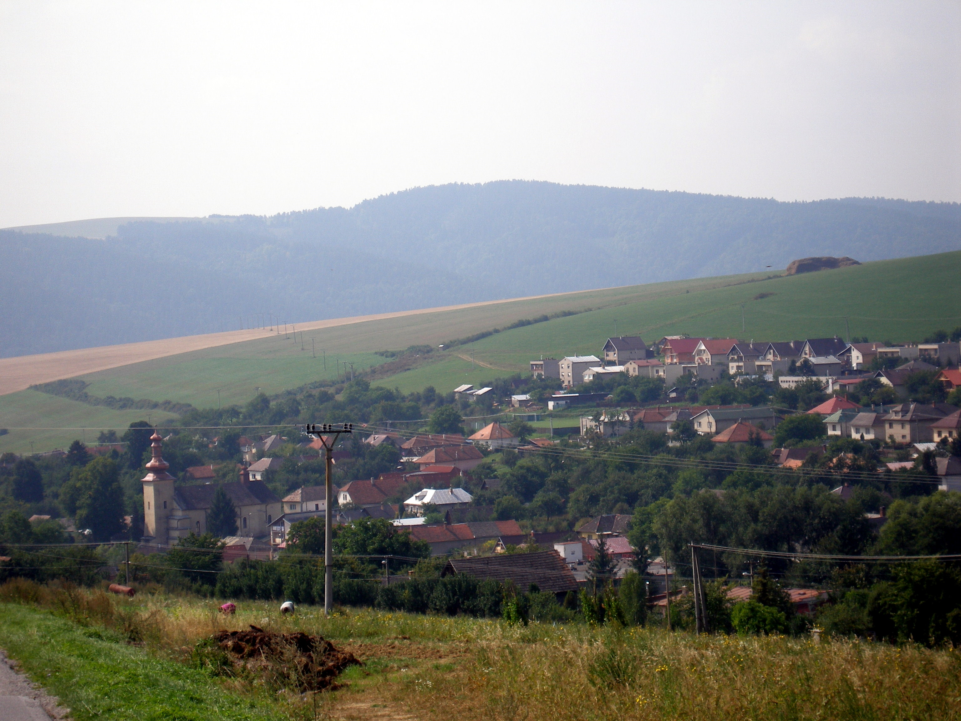 Šarišská obec Hermanovce